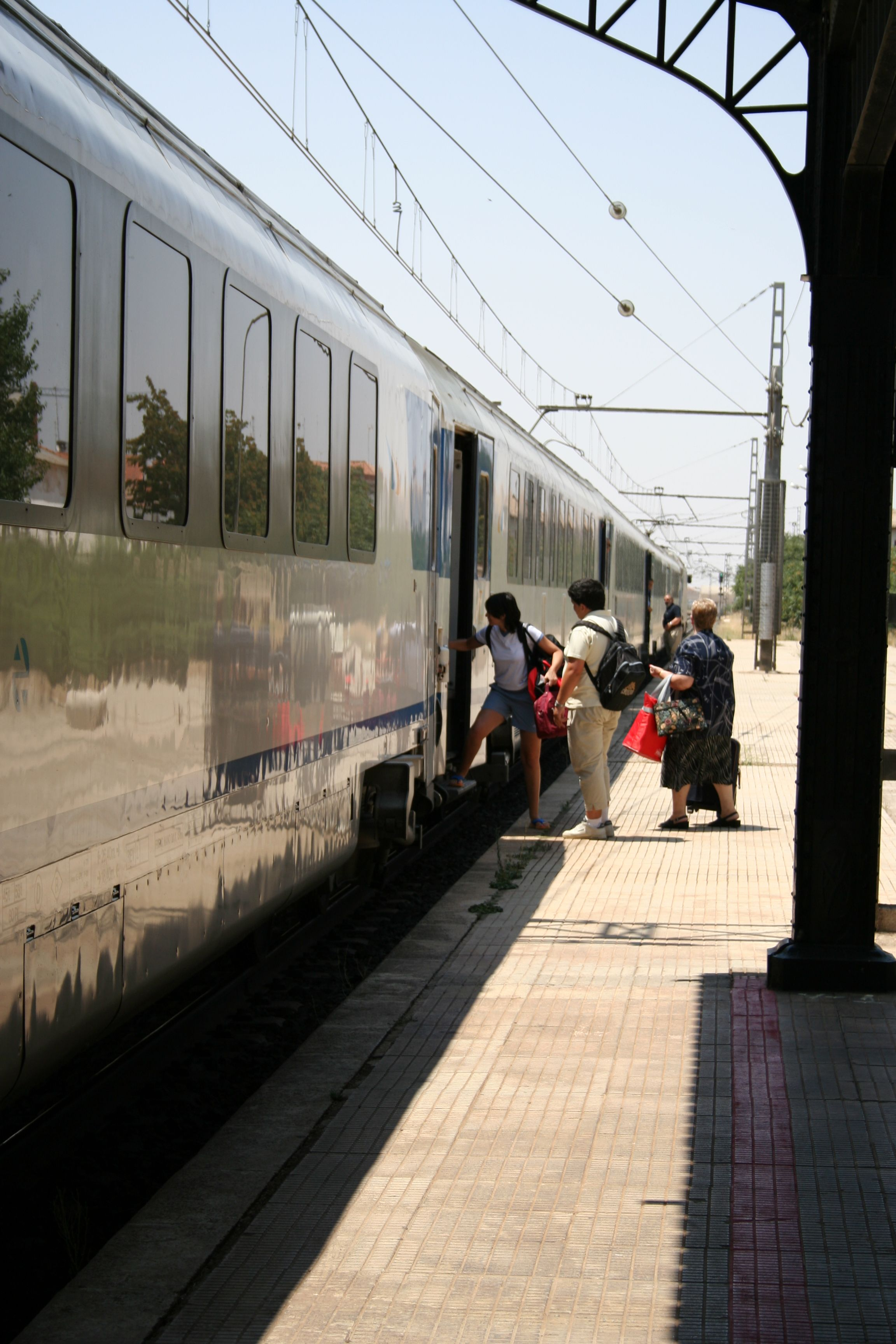 Pasajeros de tren apeándose.